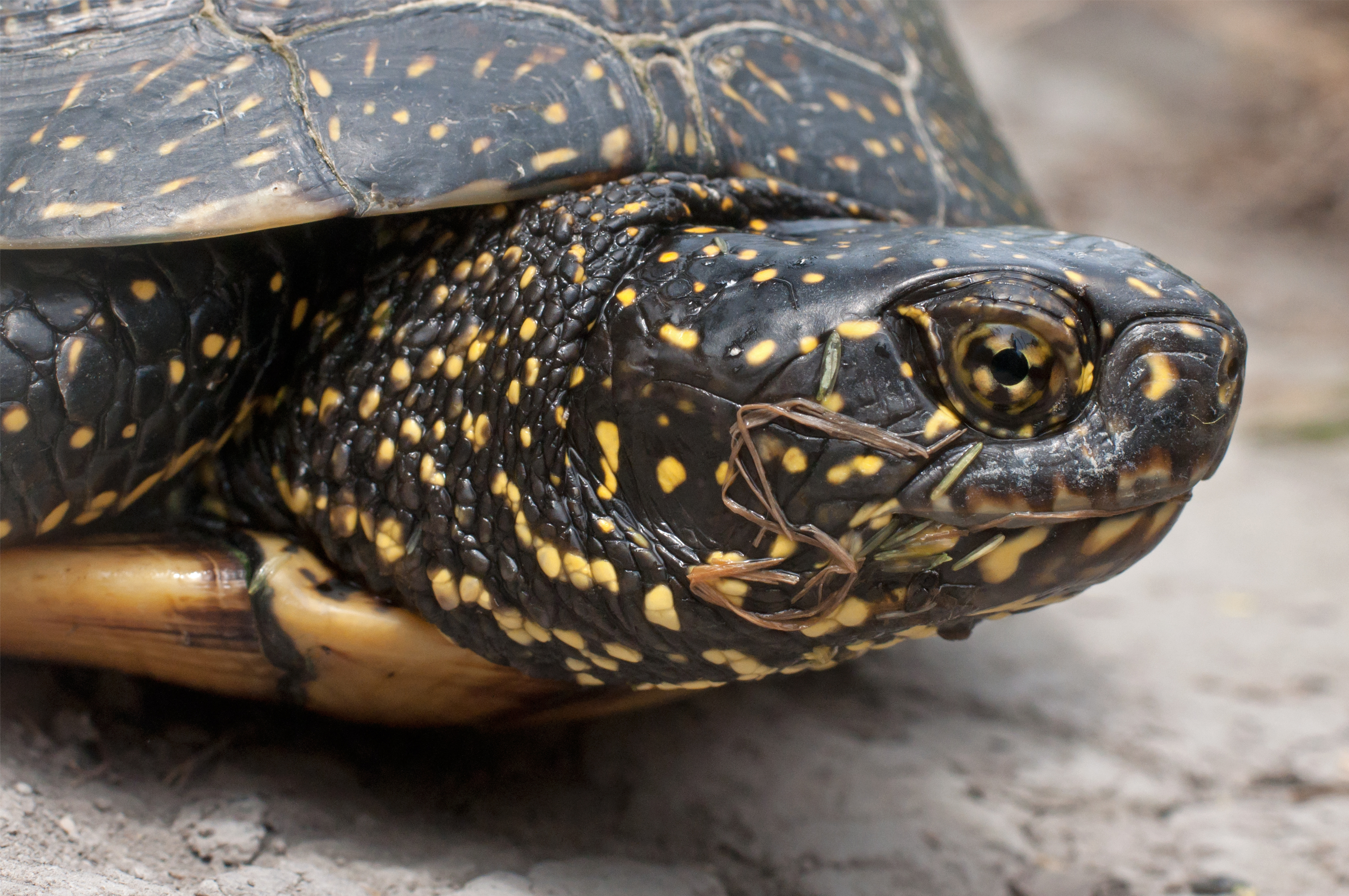 A mocsári teknős az Újtelepi Parkerdőt átszelő Erzsébet-ér kiemelt, Natura 2000 jelölő faja.